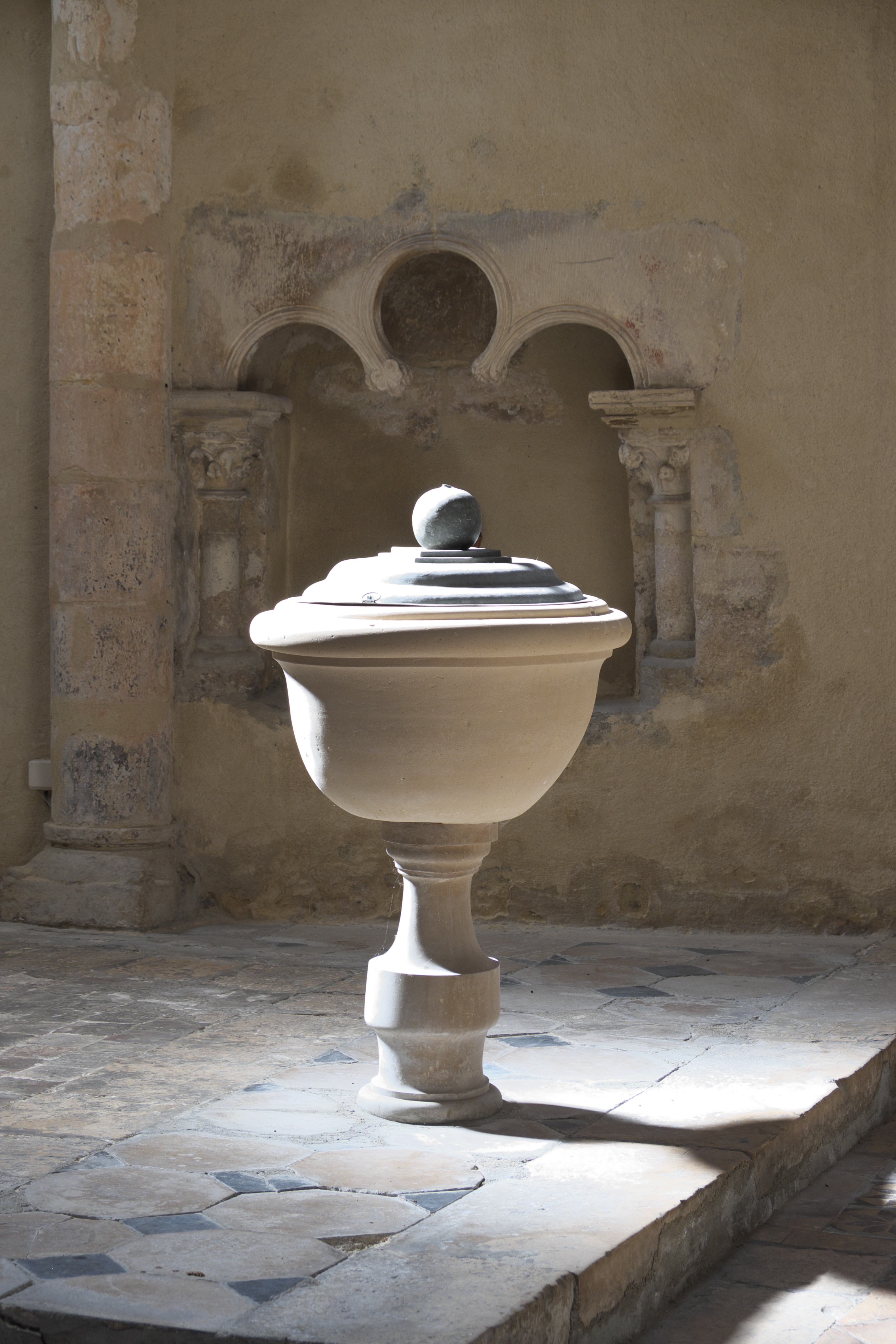 Katholische Kirche Notre-Dame-de-la-Nativité (Mariä Geburt) in Donnemarie-Dontilly im Département Seine-et-Marne (Île-de-France/Frankreich), Taufbecken, im Hintergrund Piscina